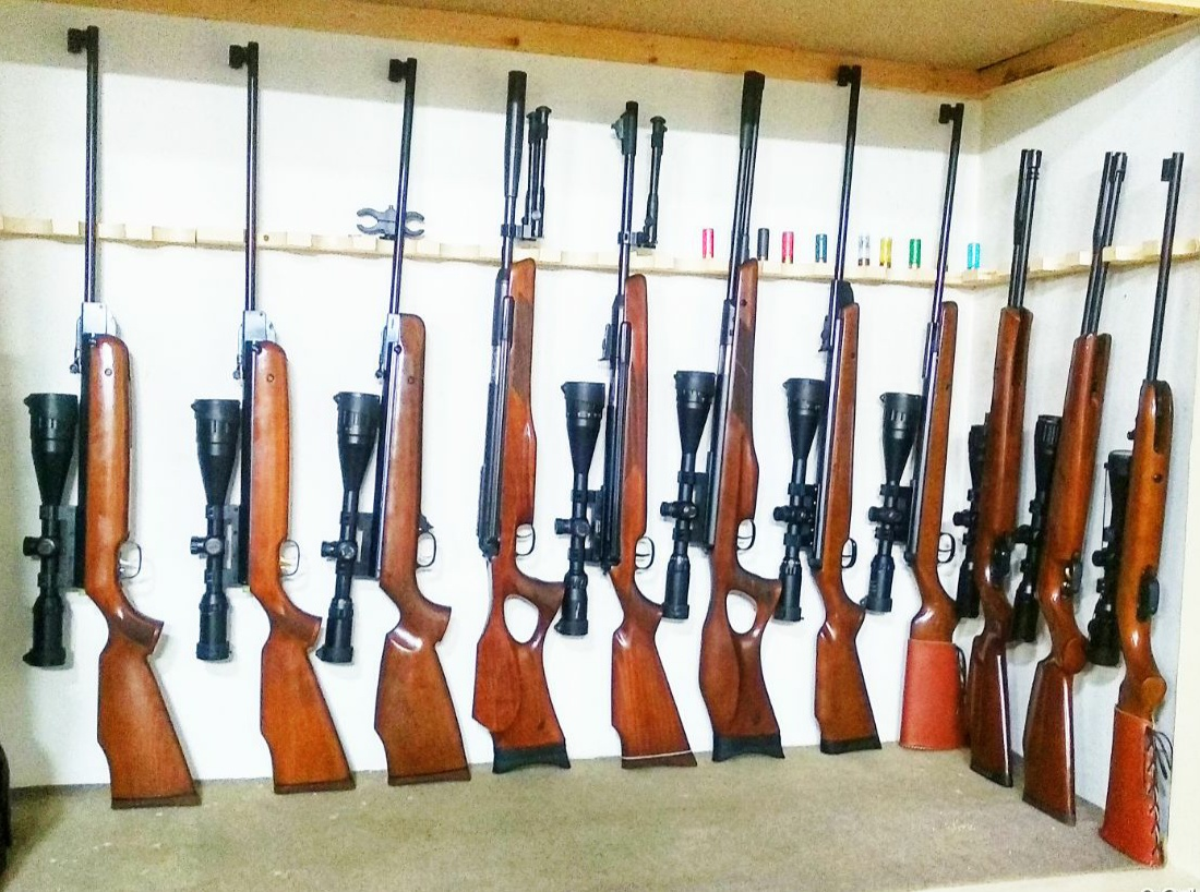 مجموعه ای از تفنگهای بادی فنر پیستون با مکانیزم مسلح شدن متفاوت از جمله کمر شکن اهرم از بغل و اهرم از زیر